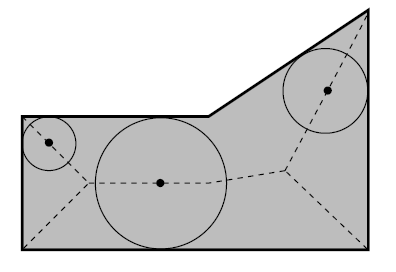 Wynik przeprowadzenia procesu szkieletyzacji na obiekcie dwówymiarowym